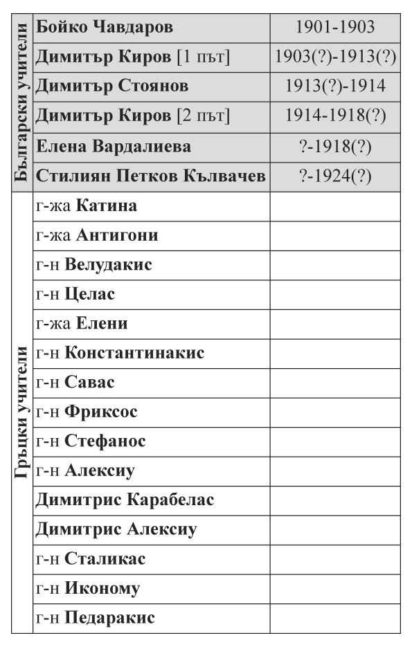 Списък на учителите в село Дерекьой (Гюмюрджинско)